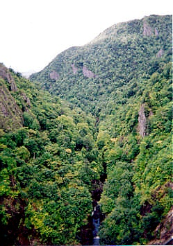 Dam